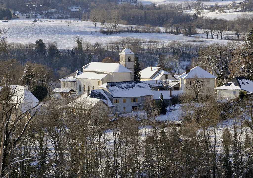 Vue d'ensemble de Chez Davy